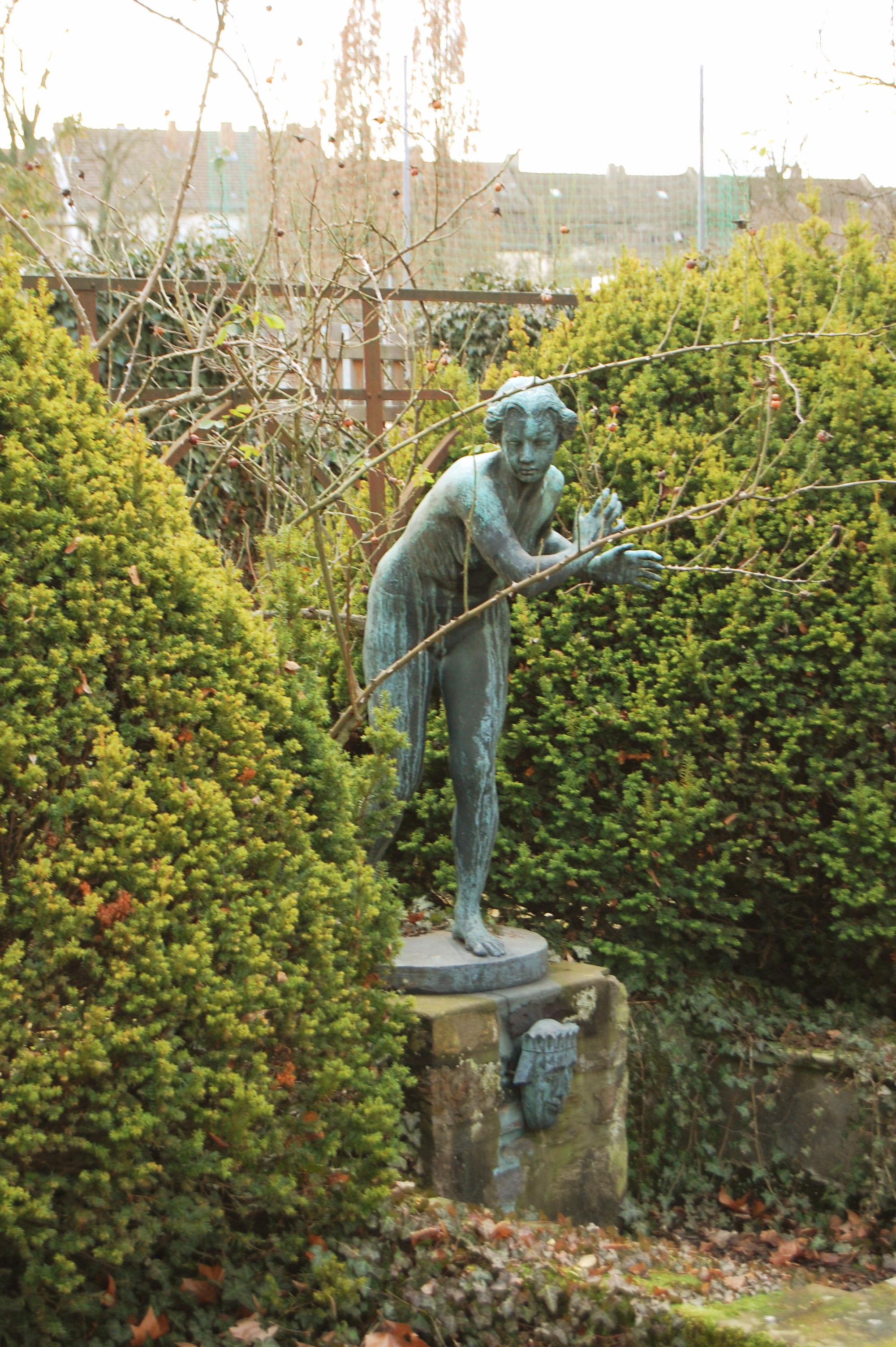 Haus Gentil - rzeźba w ogrodzie